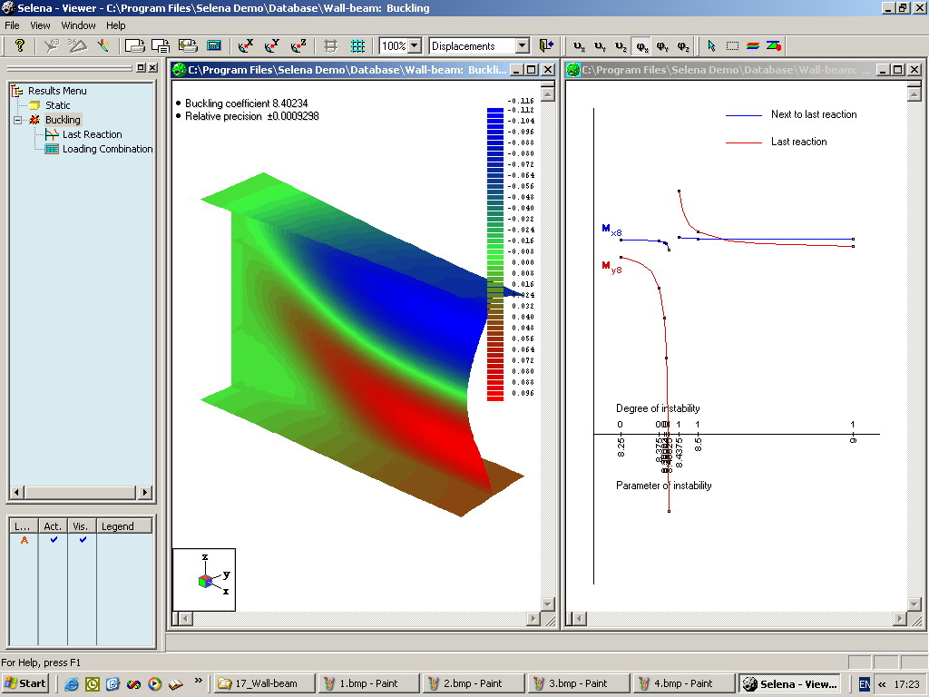 Модель балки стенки. Форма потери устойчивости и диаграмма изменения реакции в последней сбрасываемой связи.